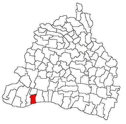 Amplasarea în cadrul județului.